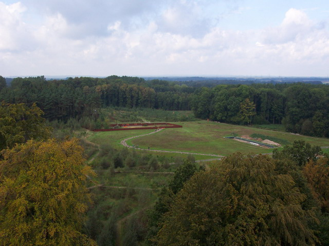 Schlachtfeld der Varusschlacht in Kalkriese